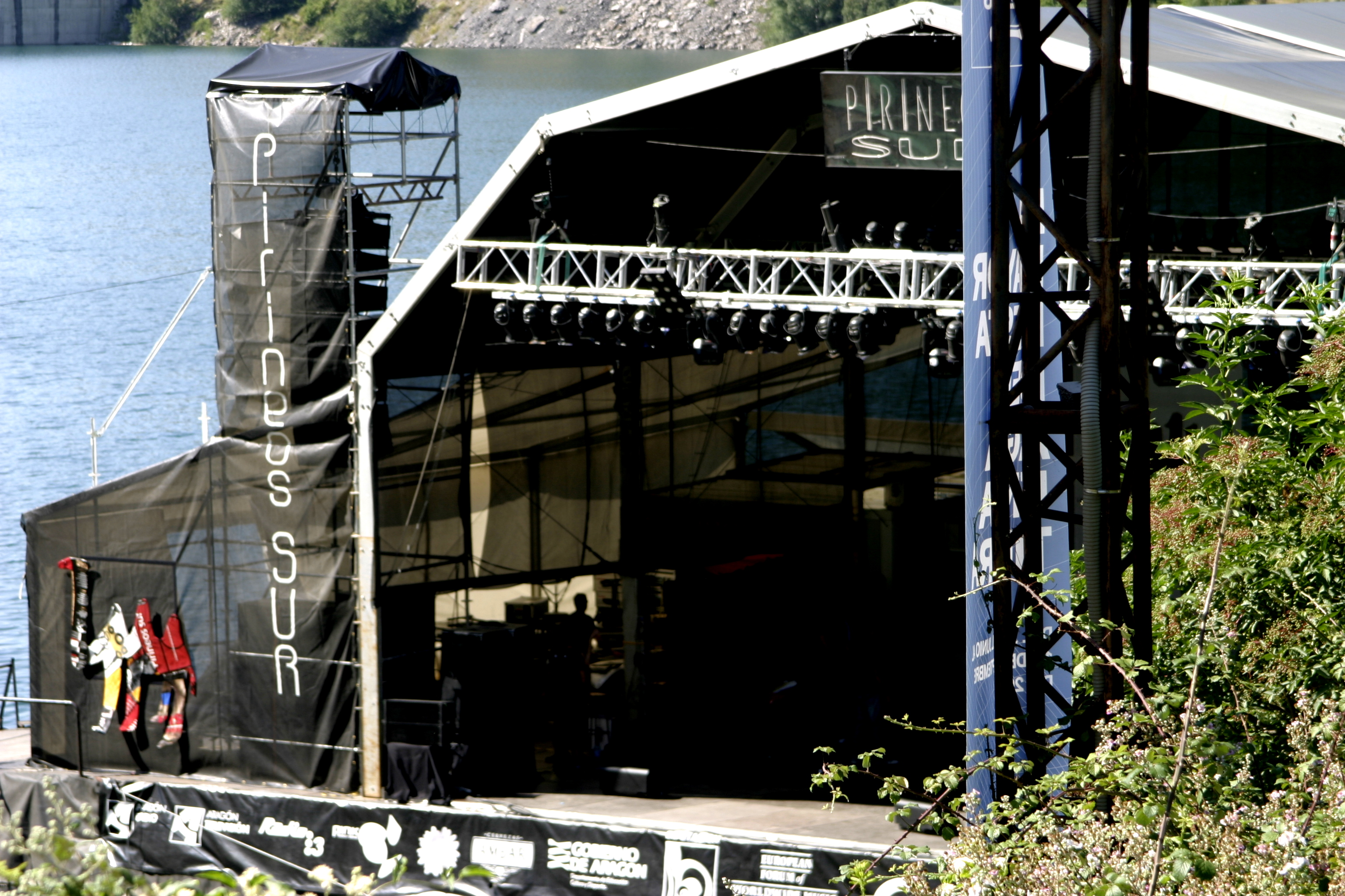 Escenario flotante Pirineos Sur